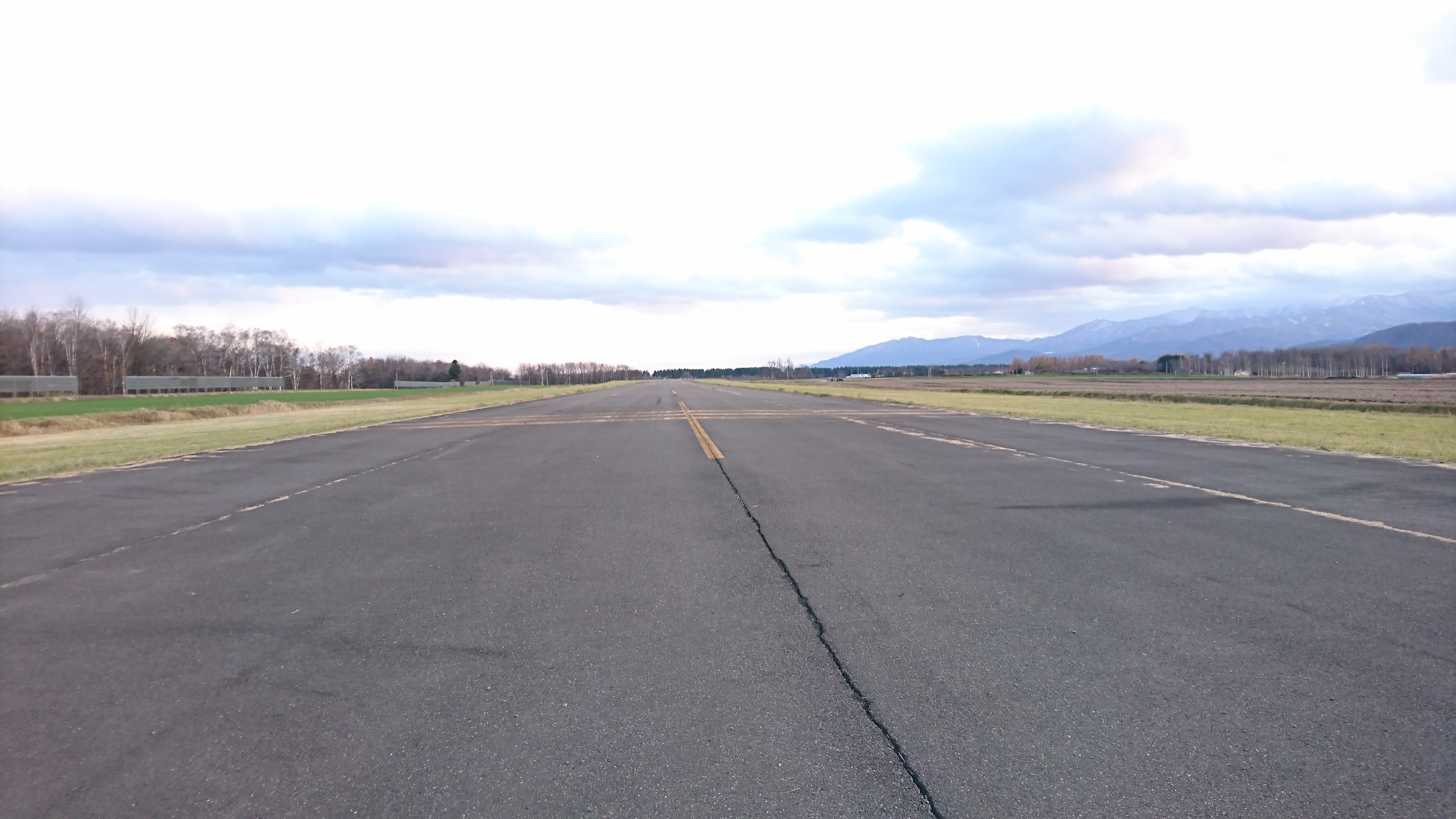 滑走路35方向遠望